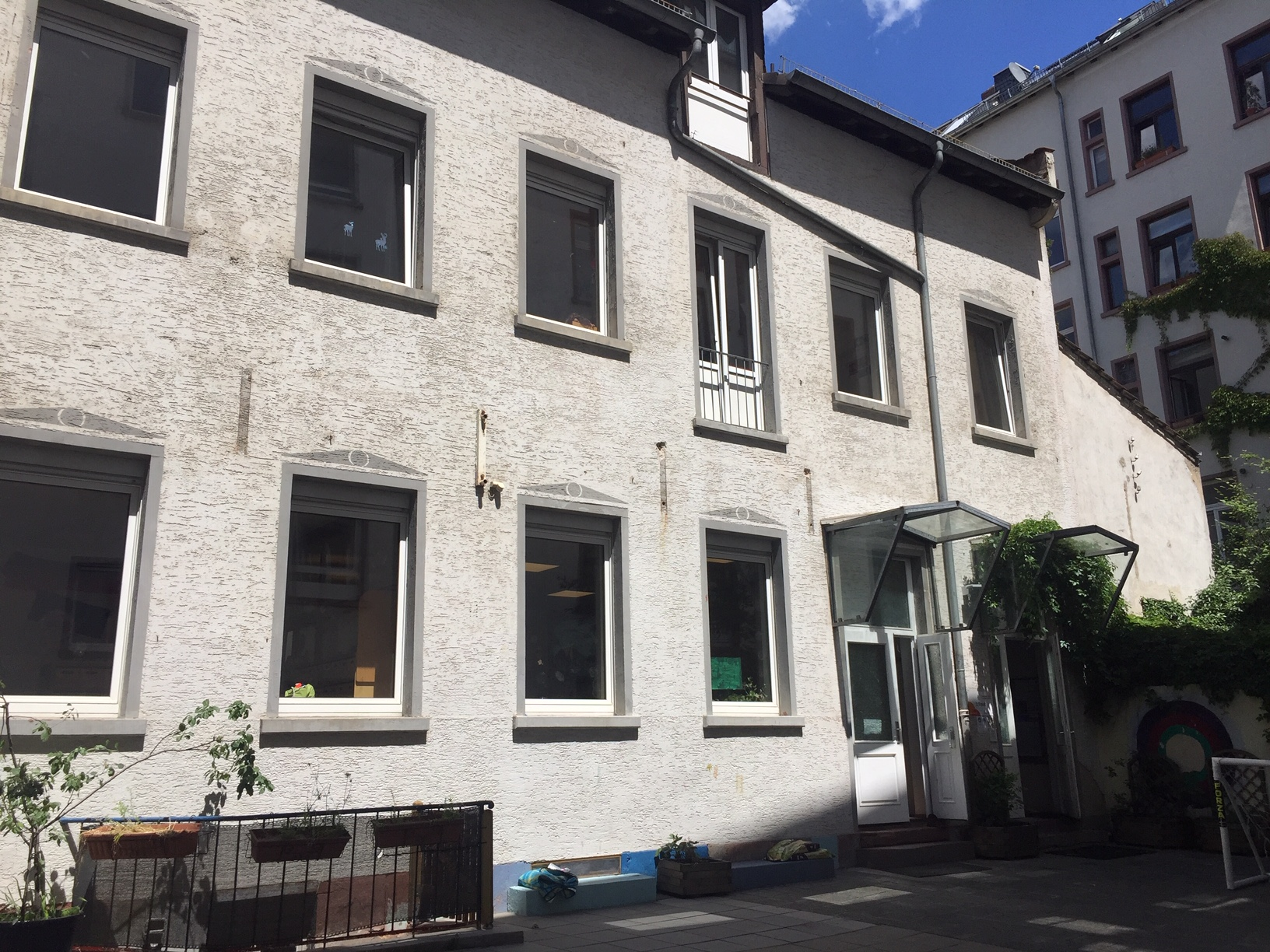 Standort des Familiengesundheitszentrums im Hinterhaus der Neuhofstrasse 32 in Frankfurt am Main seit 1988